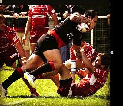 Sébastien Martins en action s'est emparé du ballon et s'apprête à marquer un essai.